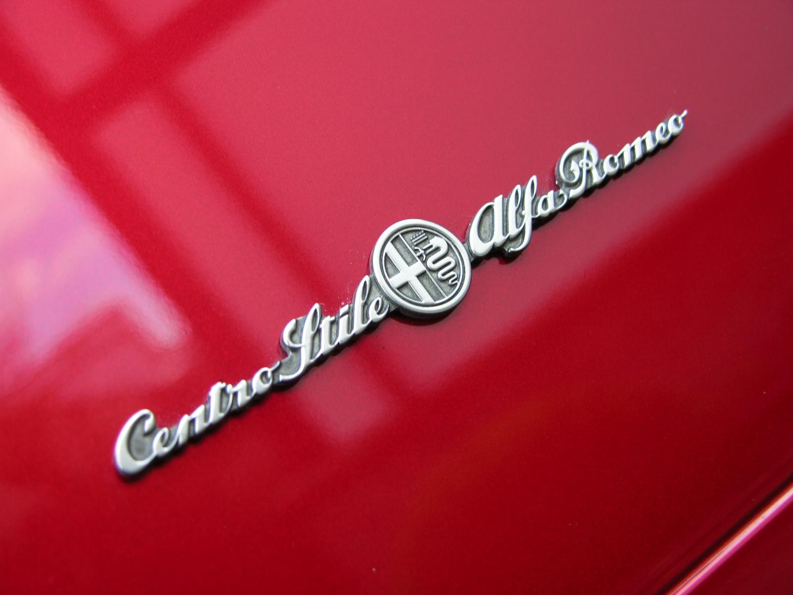 Alfa Romeo 8c Spider